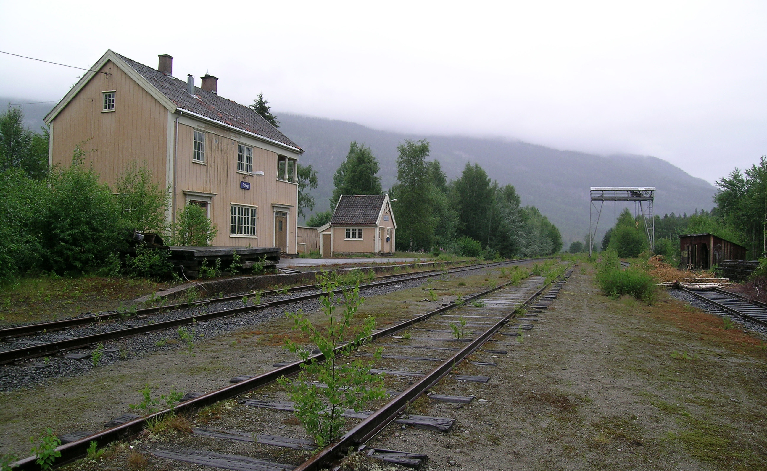 Numedalsbanen. Rollag station.